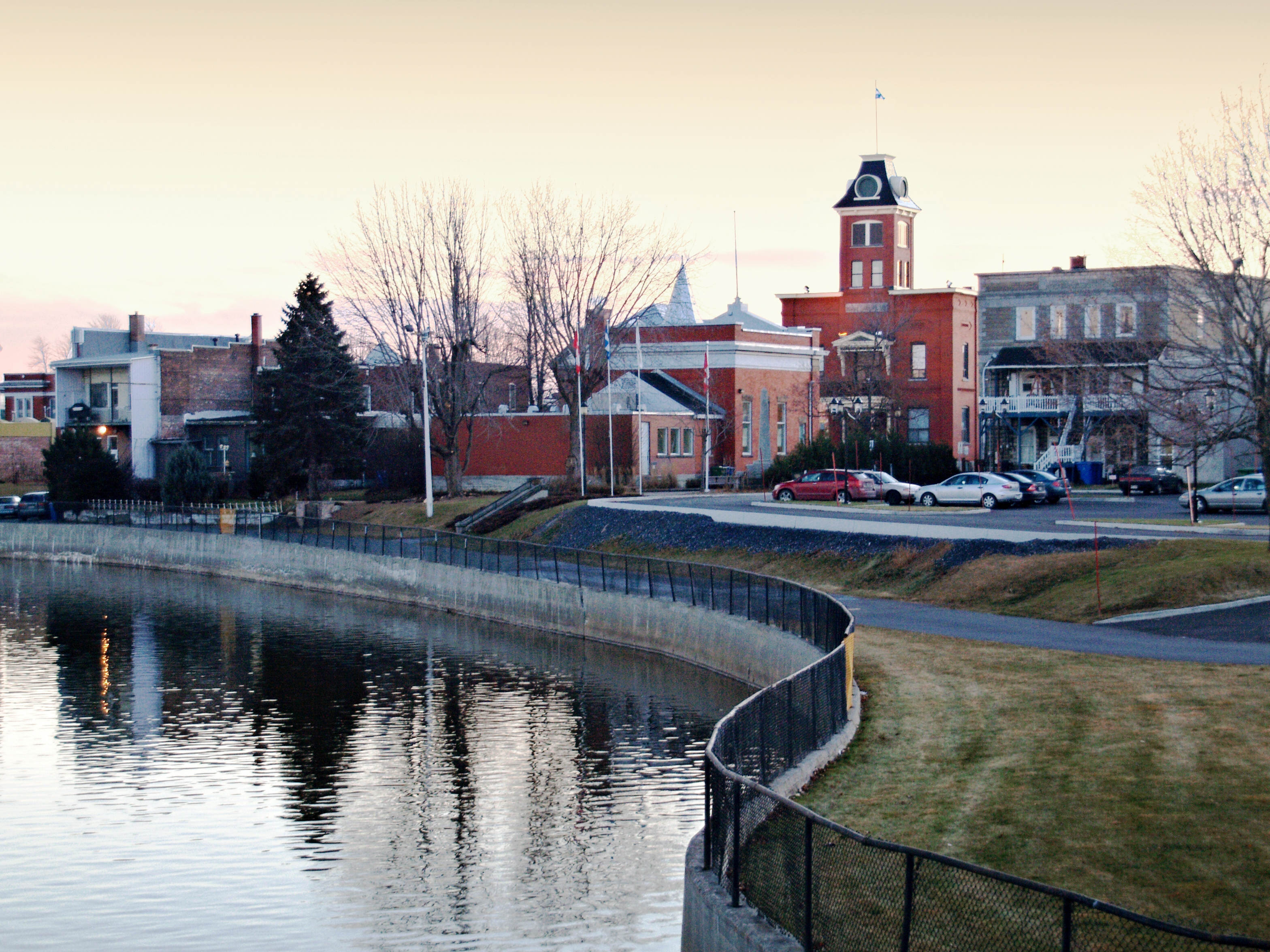 Farnham (Québec) - Vue du Centre-ville